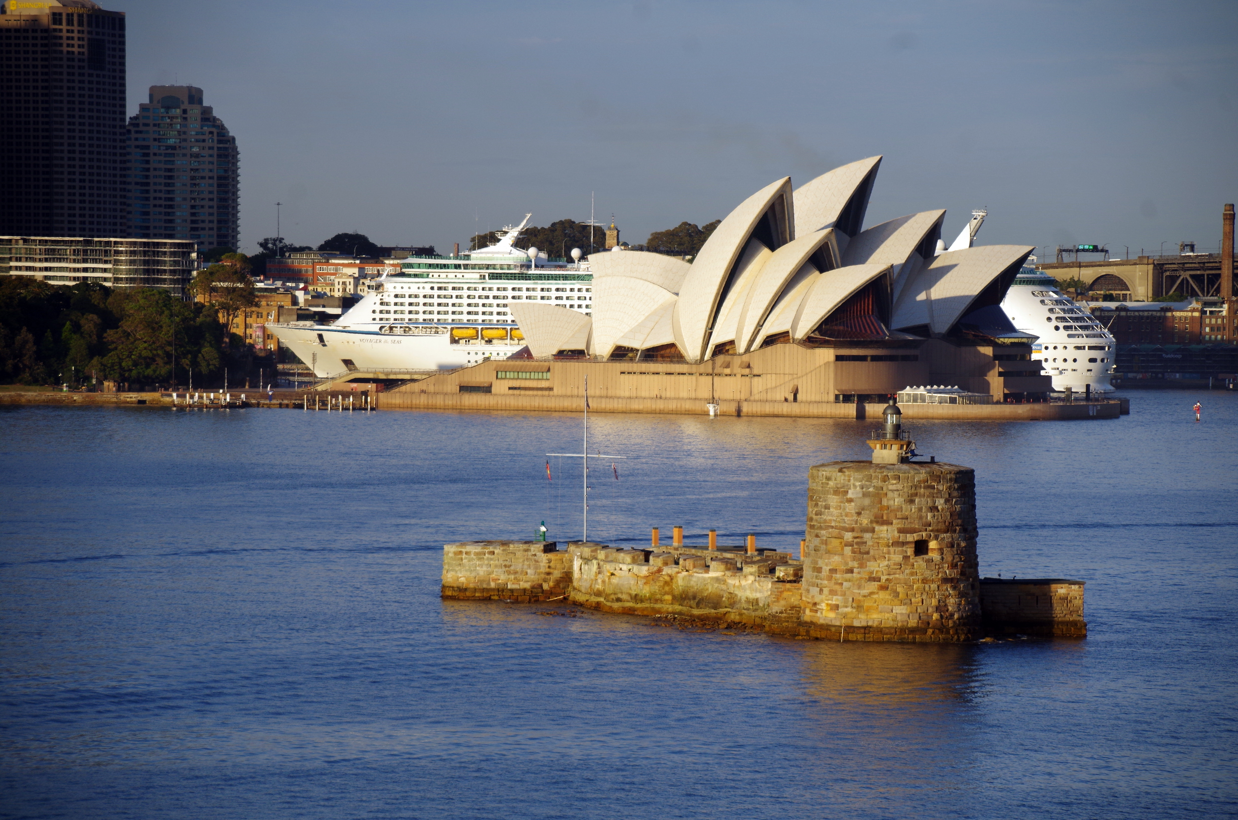 Sydney Einfahrt